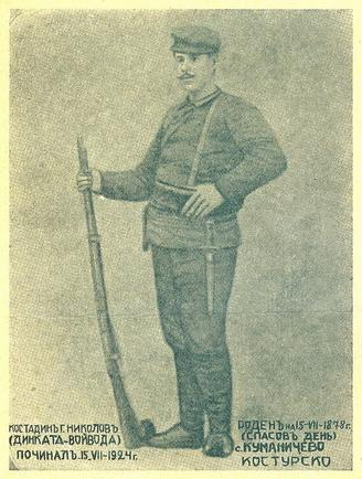 Костадин Николов.